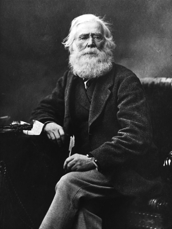 William E. Logan (1798 - 1875), Canadian geologist